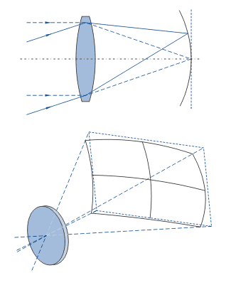 Object